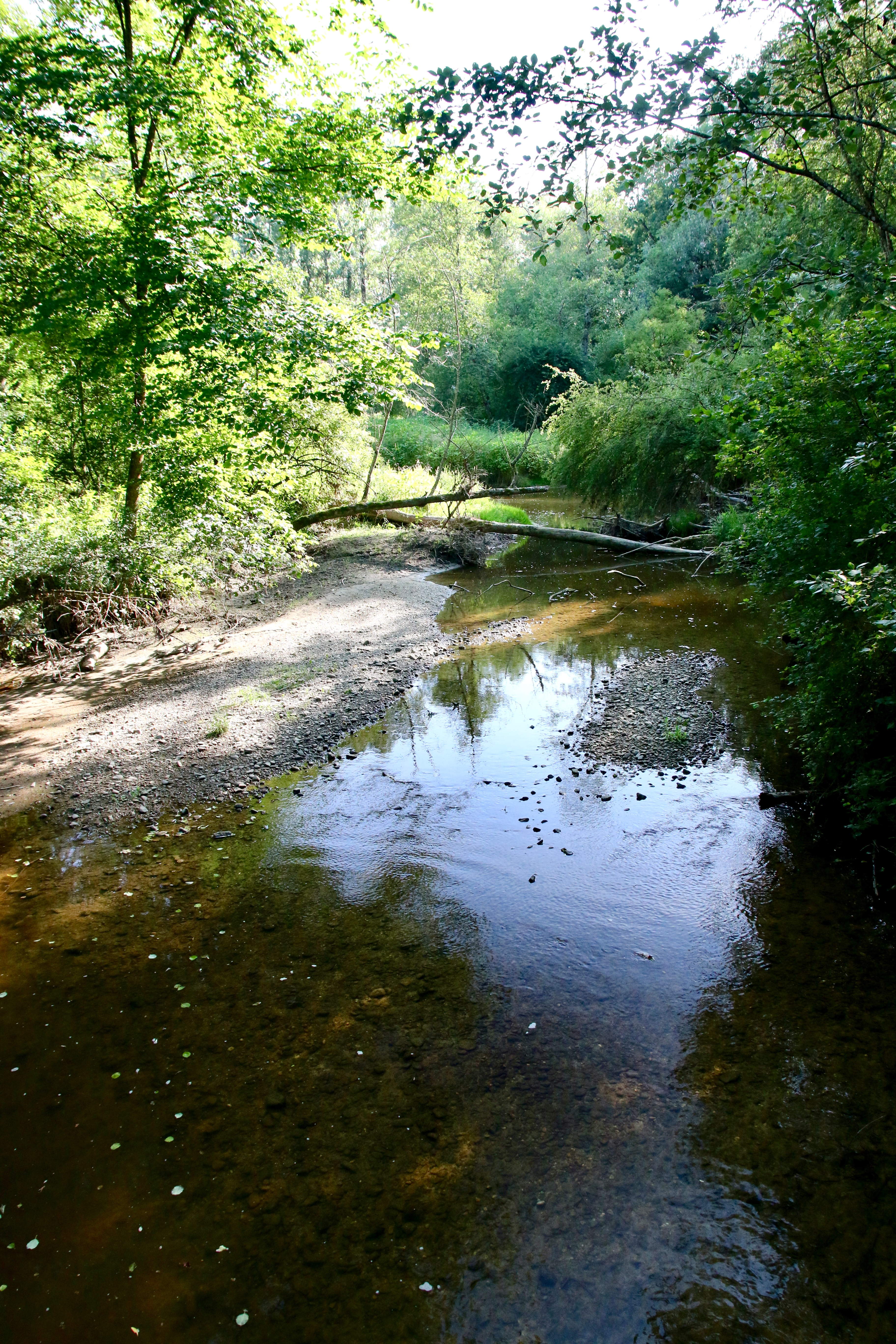 Die Eyach im Mündungsbereich zur Ammer.